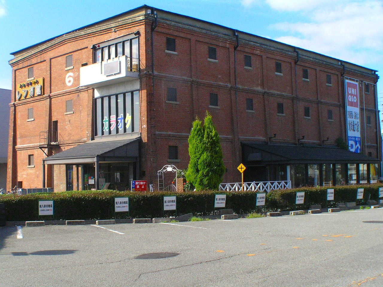 店舗構成 イーストモール 14の専門店 サウスモール 20の専門店 マクドナルド ウエストモール 15の専門店 コナミスポーツクラブ レポスデリカ 8つの専門店 レポスダイニング 6つの専門店 レポスフードコート 5つの専門店 コープこうべ 店舗内に9つの専門店 ミドリ電化 ダイキ（ホームセンター） ニッケパークボウル（ボウリング場） GAME STATION PALO（ゲームセンター） くら蔵（和食レストラン） カラオケレンガ館（カラオケボックス） UNIQLO